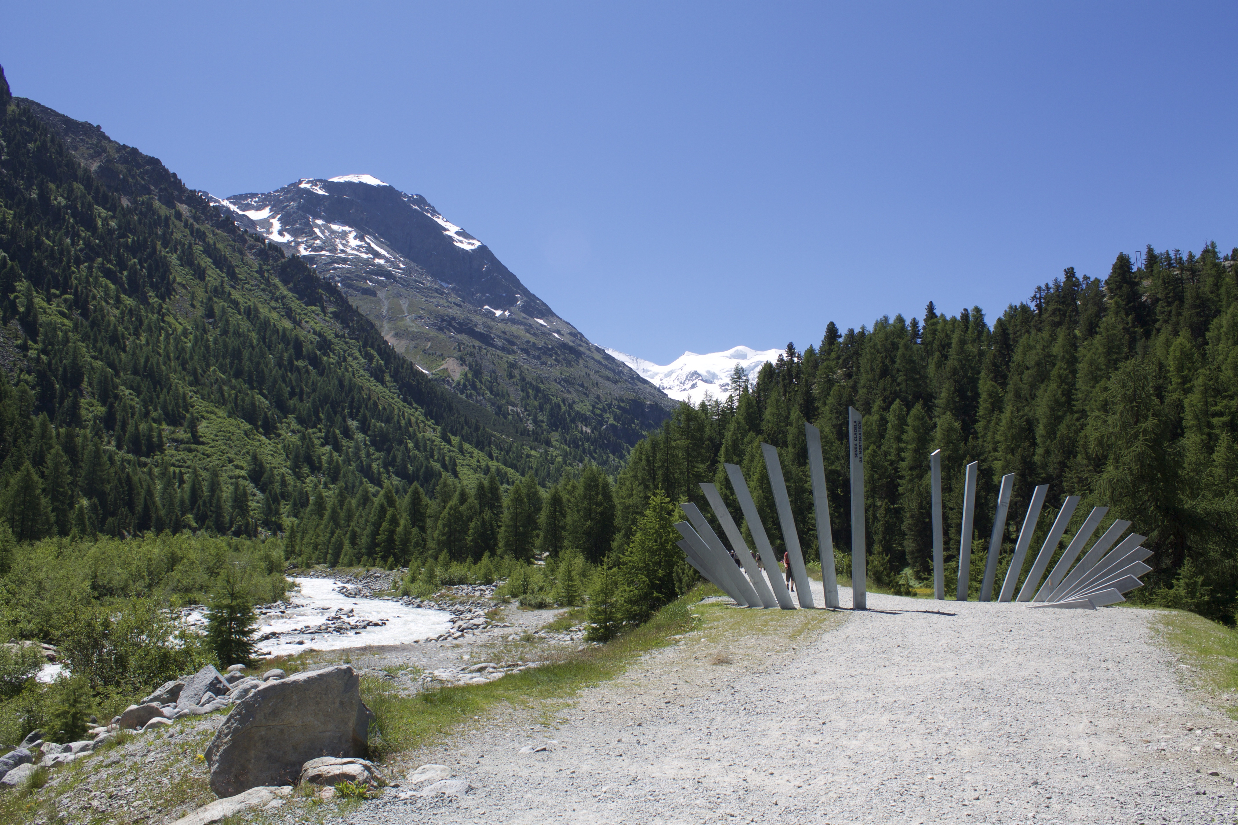 Vadret da Morteratsch